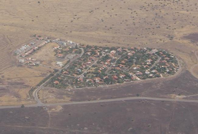 חד נס. תמונה ממערב. תמונה שצילמתי והעלתי. אסף.צ 16:23, 12 ספטמבר 2005 (UTC)